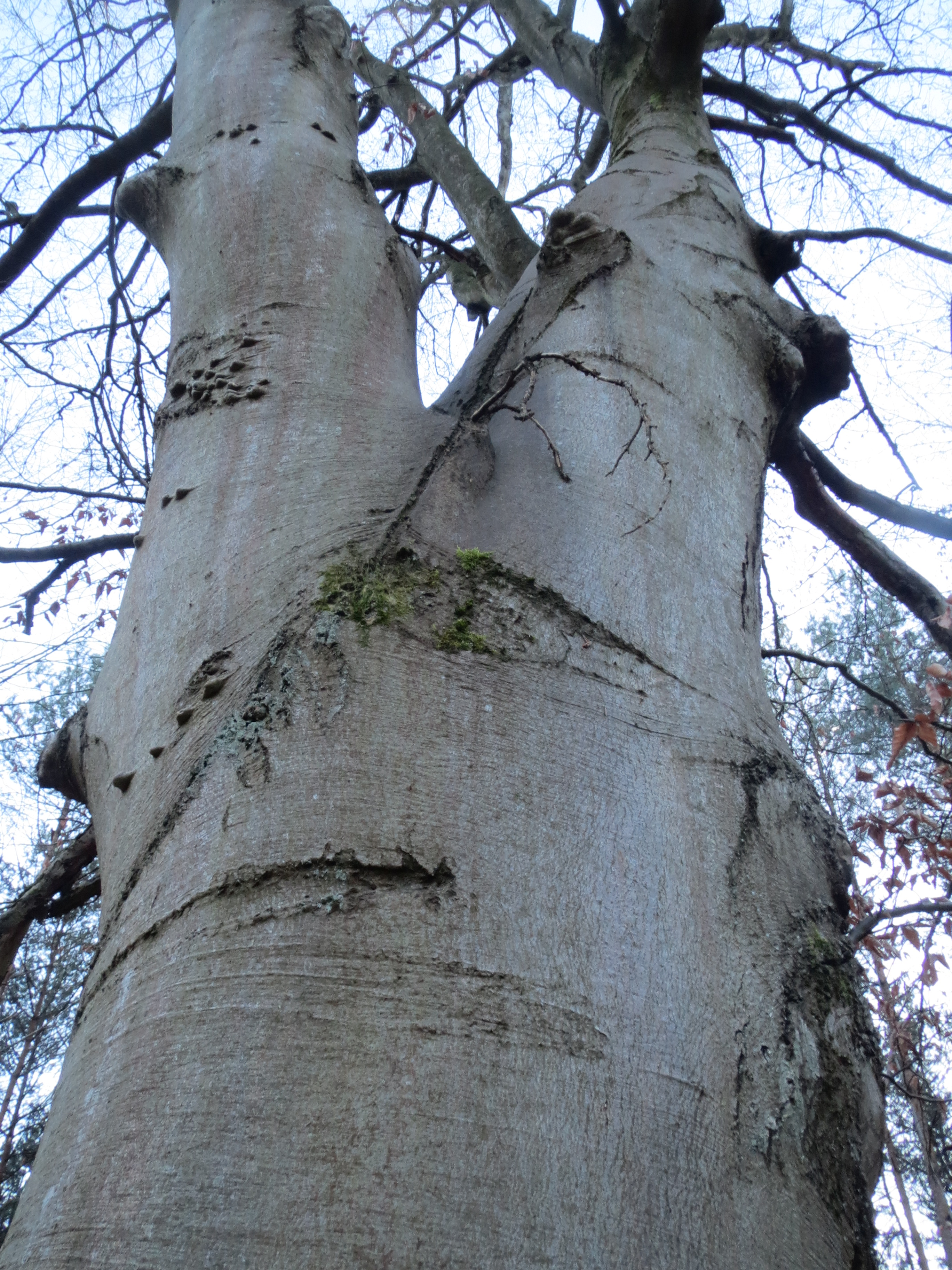 Buche (Fagus sylvatica) im Schwetzinger Hardt